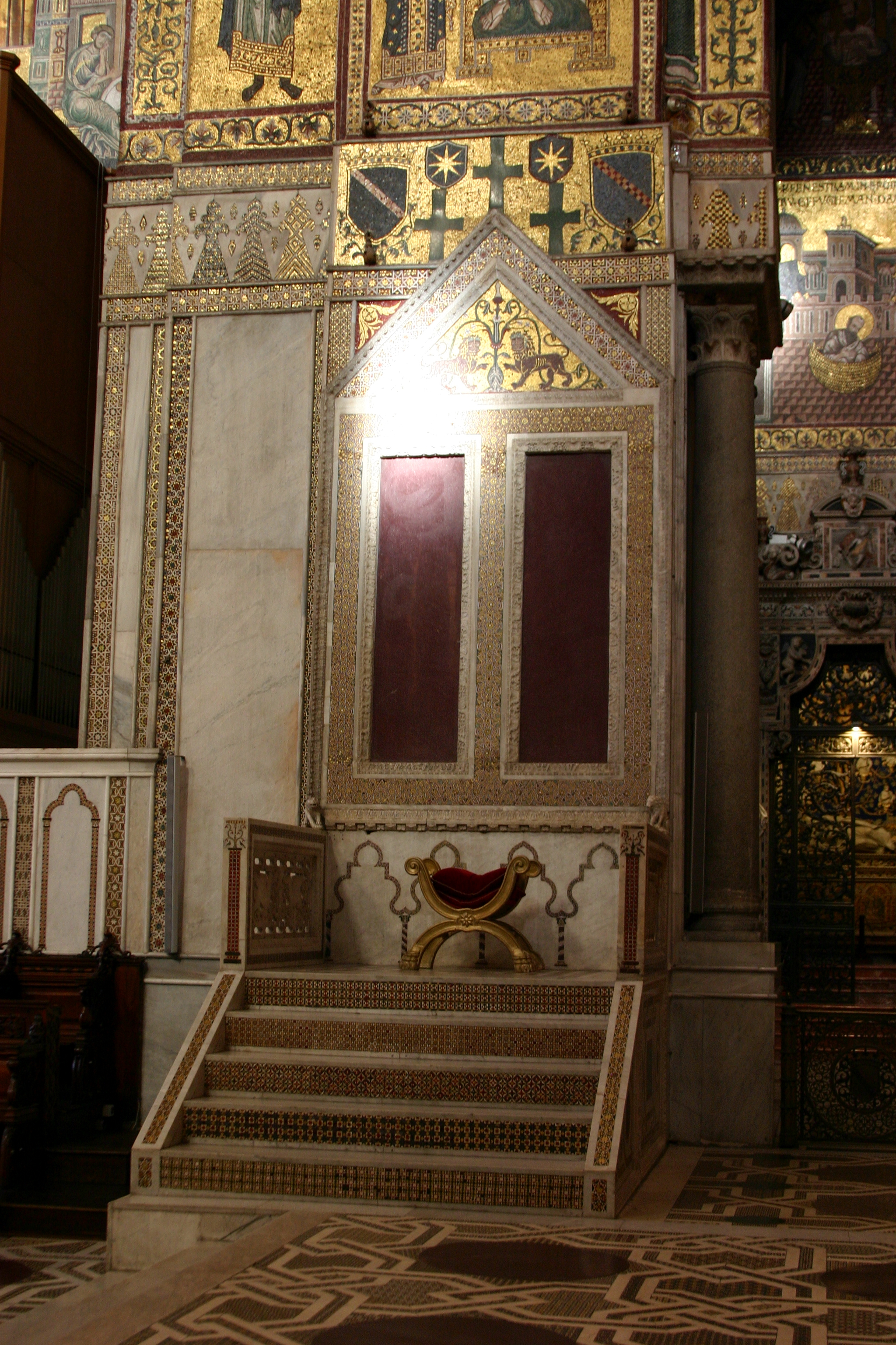 Cathedral of Monreale